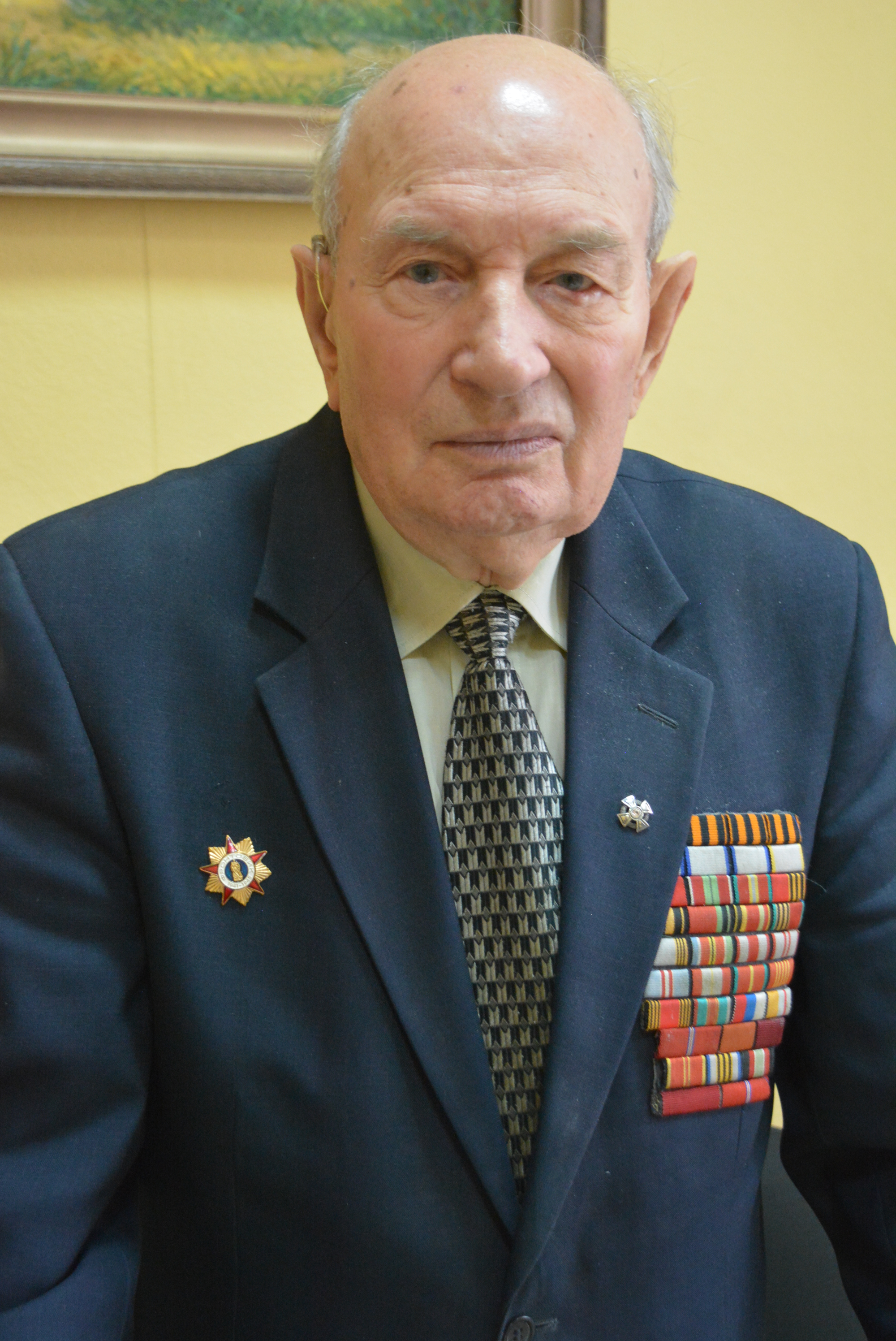 Полный кавалер ордена Славы Георгий Константинович Кравцов. 2016 г.